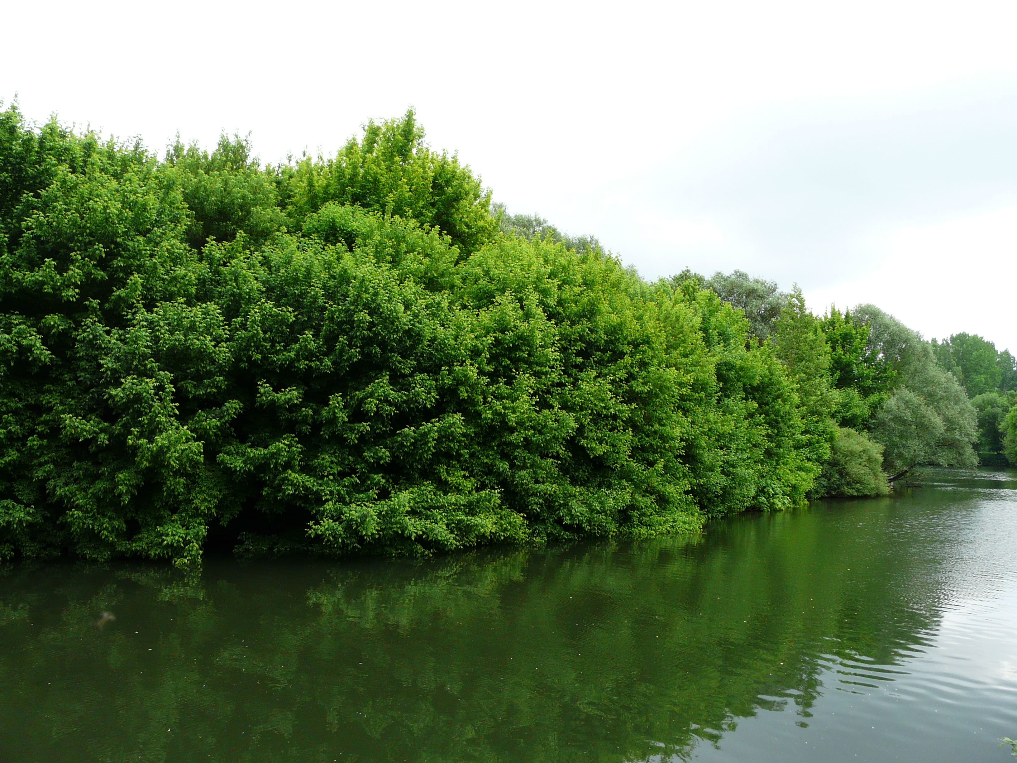 L'Isle en amont de la Roche, Saint-Martin-l'Astier, Dordogne, France.